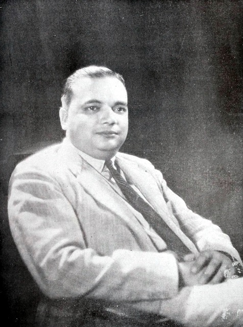 B.N. Sircar vers 1940